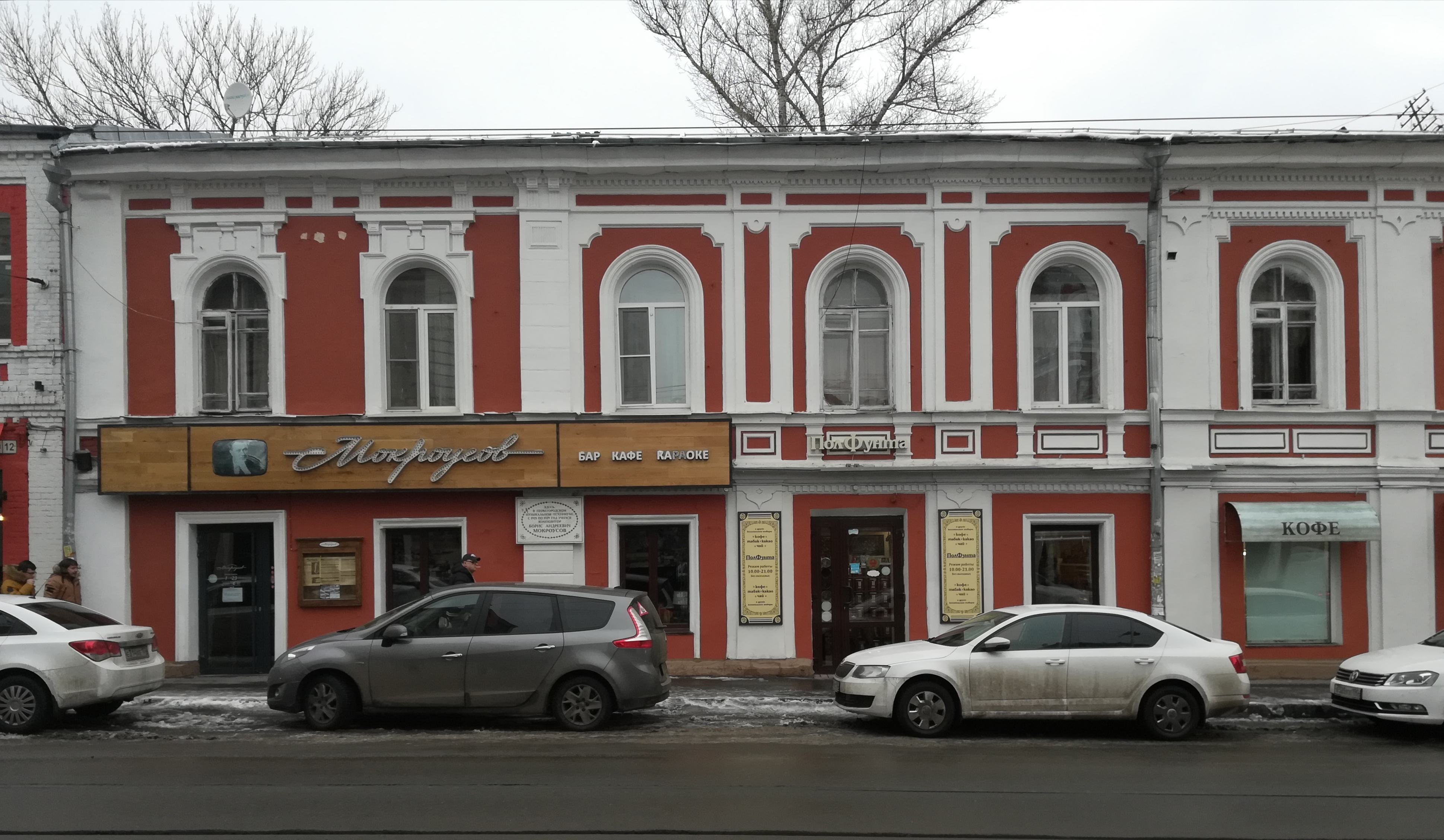 Нижний Новгород